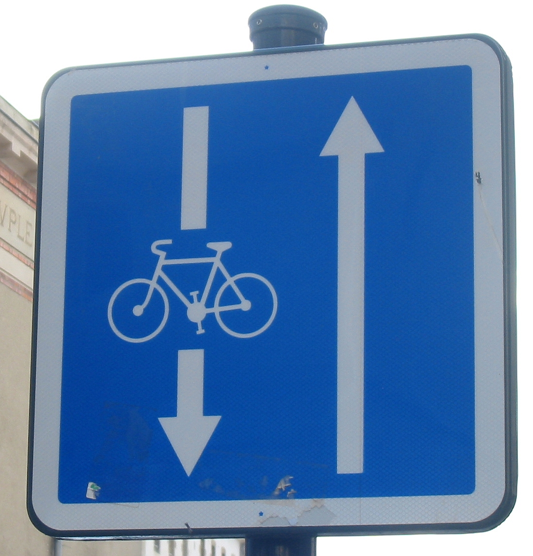 Rennes Nrf: Rennes